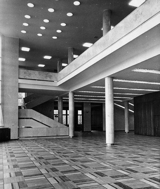 Фойе ДК ЗИЛА после реставрации